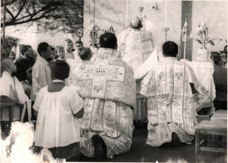 Missa celebrada em Currais Novos por Monsenhor Paulo Herôncio de Melo (1901-1963